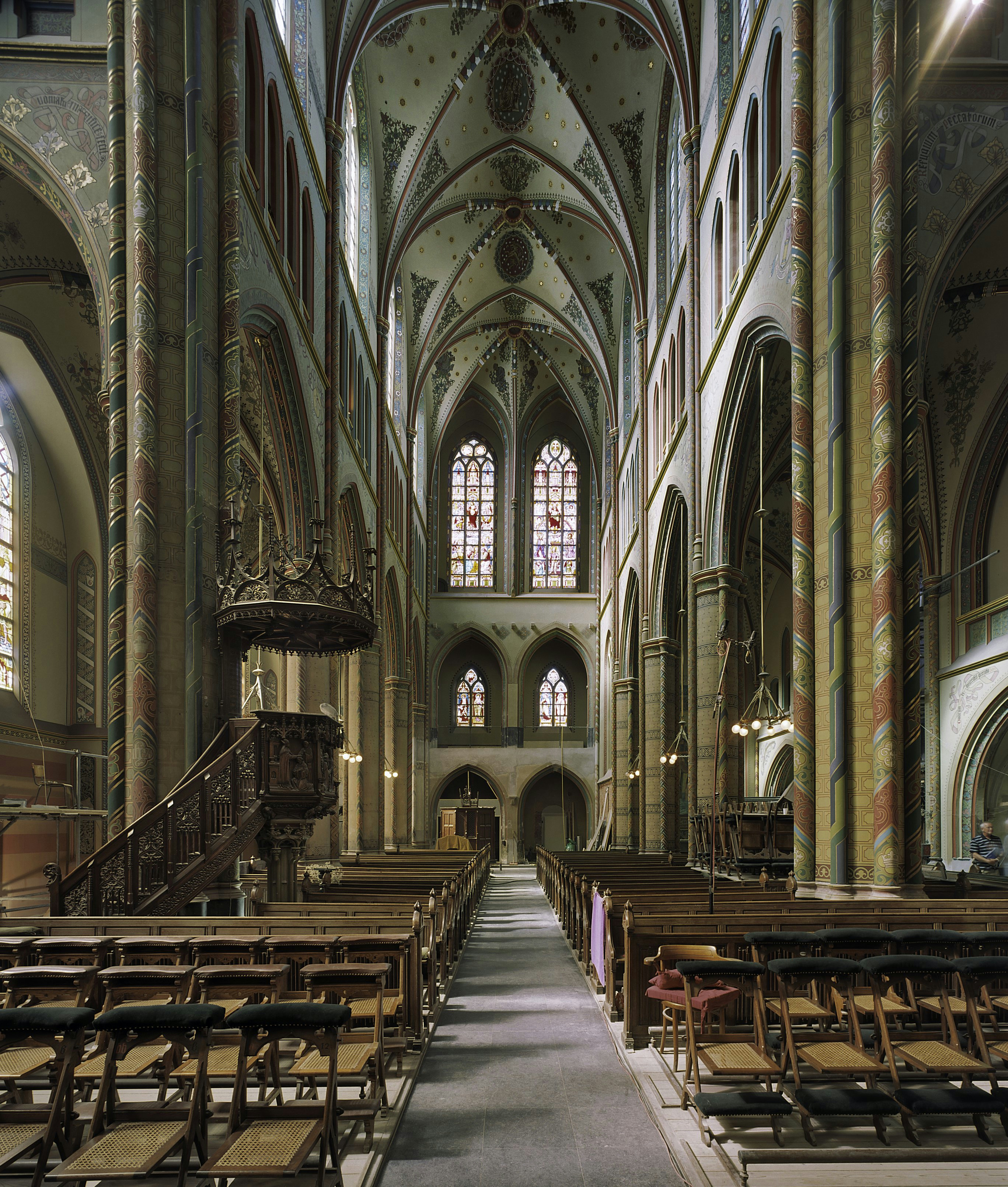 Sint Willibrorduskerk: Interieur, overzicht middenschip naar het westen (opmerking: Boek: "66 Kanjermonumenten")